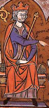 Vidal mayor. Incipit. (Primera compilación del Fuero de Aragón, realizada por el obispo de Huesca Vidal de Canellas en 1247). Jaime I de Aragón recibe del obispo y jurista Vidal de Canellas la compilación de los Fueros de Aragón ante otros magnates eclesiástico. En el plano inferior, otros ricos hombres y magnates de la curia familiar departen animadamente. Texto: «Nos, don Iavmes, por la g[rat]ia de Dius rey d'Aragón et de Malliorgas et de Ualentia, conde de Barcalona et [...]»